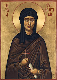 Synkletike.